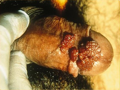 genital warts